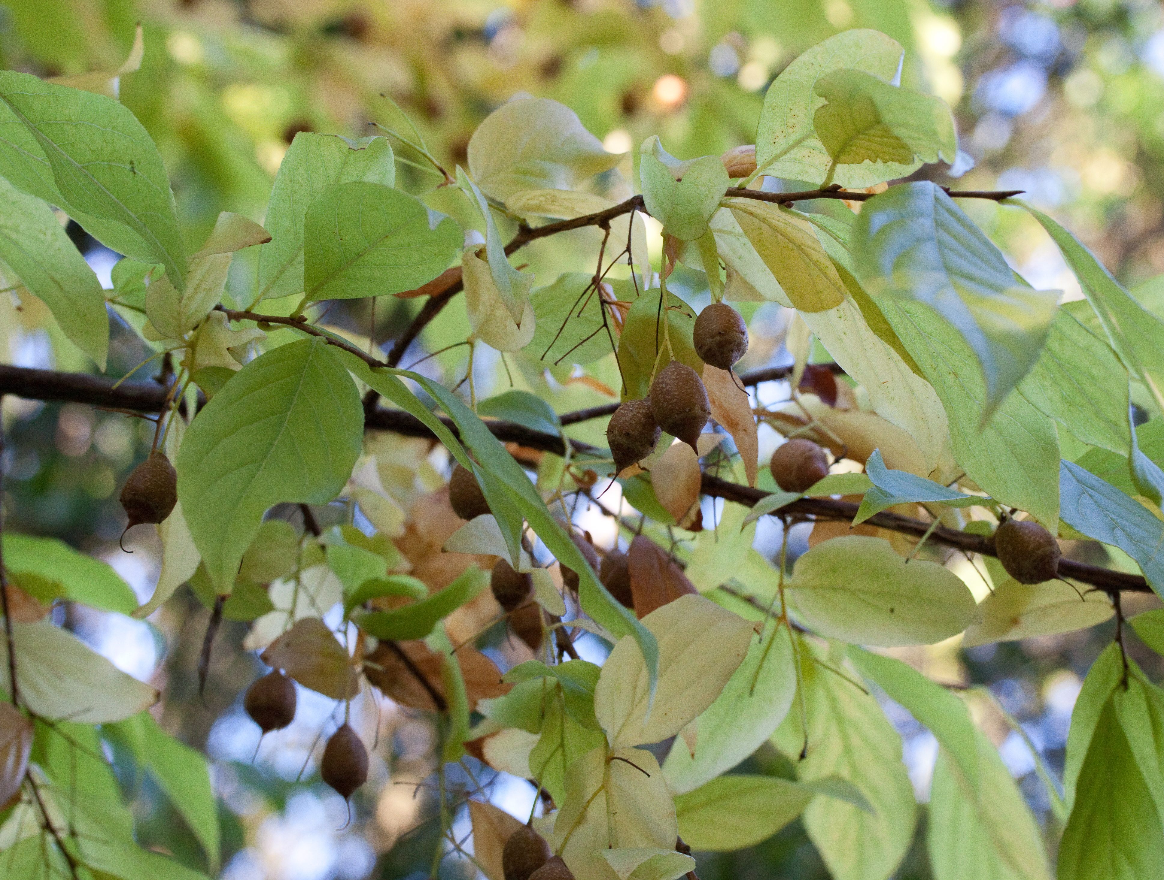 Fruits de Sinojackia xylocarpa et début de coloration automnale - Jardin botanique de Strasbourg - France